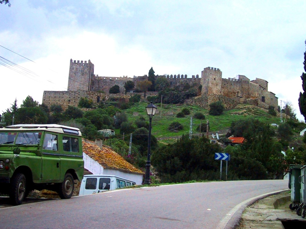 Burg Castellar de la Frontera